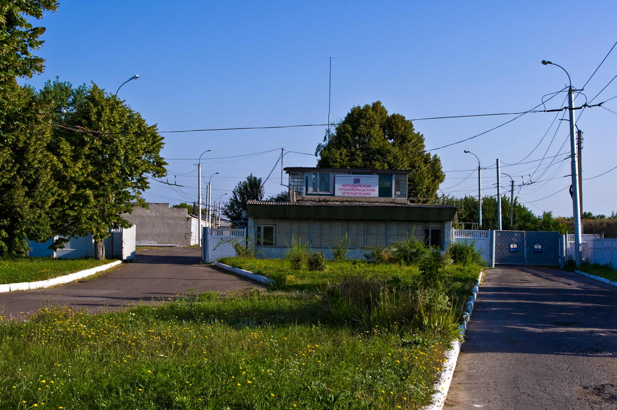 Муниципальное унитарное предприятие "Бендерское троллейбусное управление"